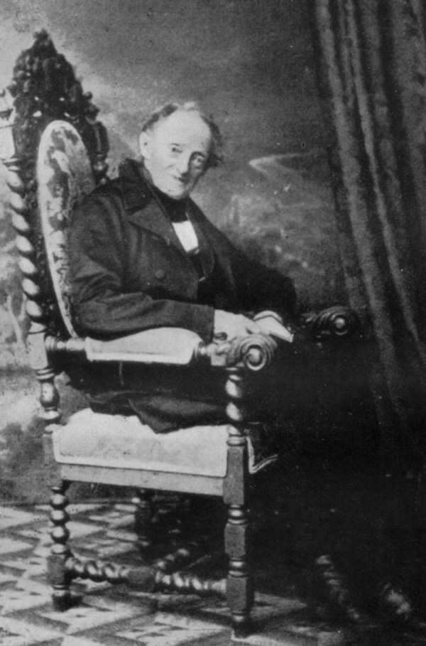 Fotografie von G. W. Issel im Jahre 1865